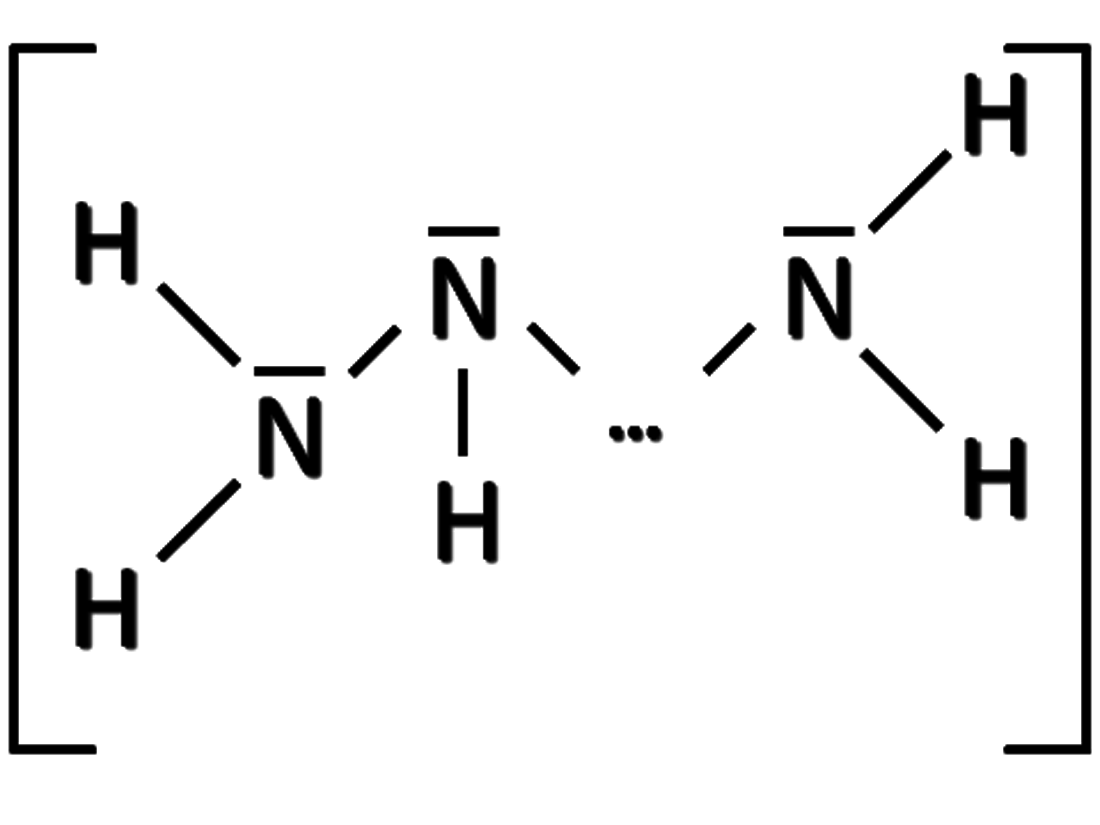 Struttura Lewis generale di un composto azano